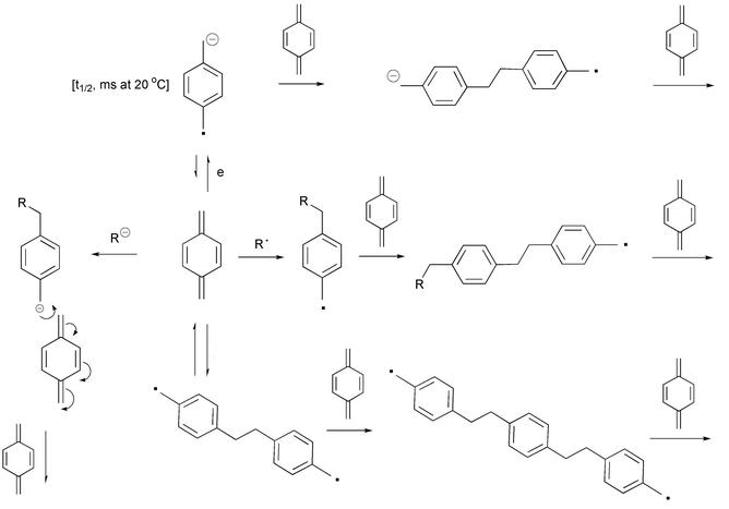 voies de polymérisation du p-xylylène